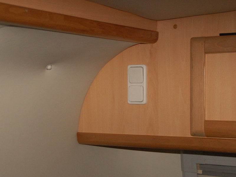 Typisch BIOD interieur detail